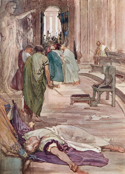 L'assassinio di Cesare, illustrazione tratta da "Plutarch's Lives for Boys and Girls, raccontati da W.H. Weston, London 1910", litografia a colori.